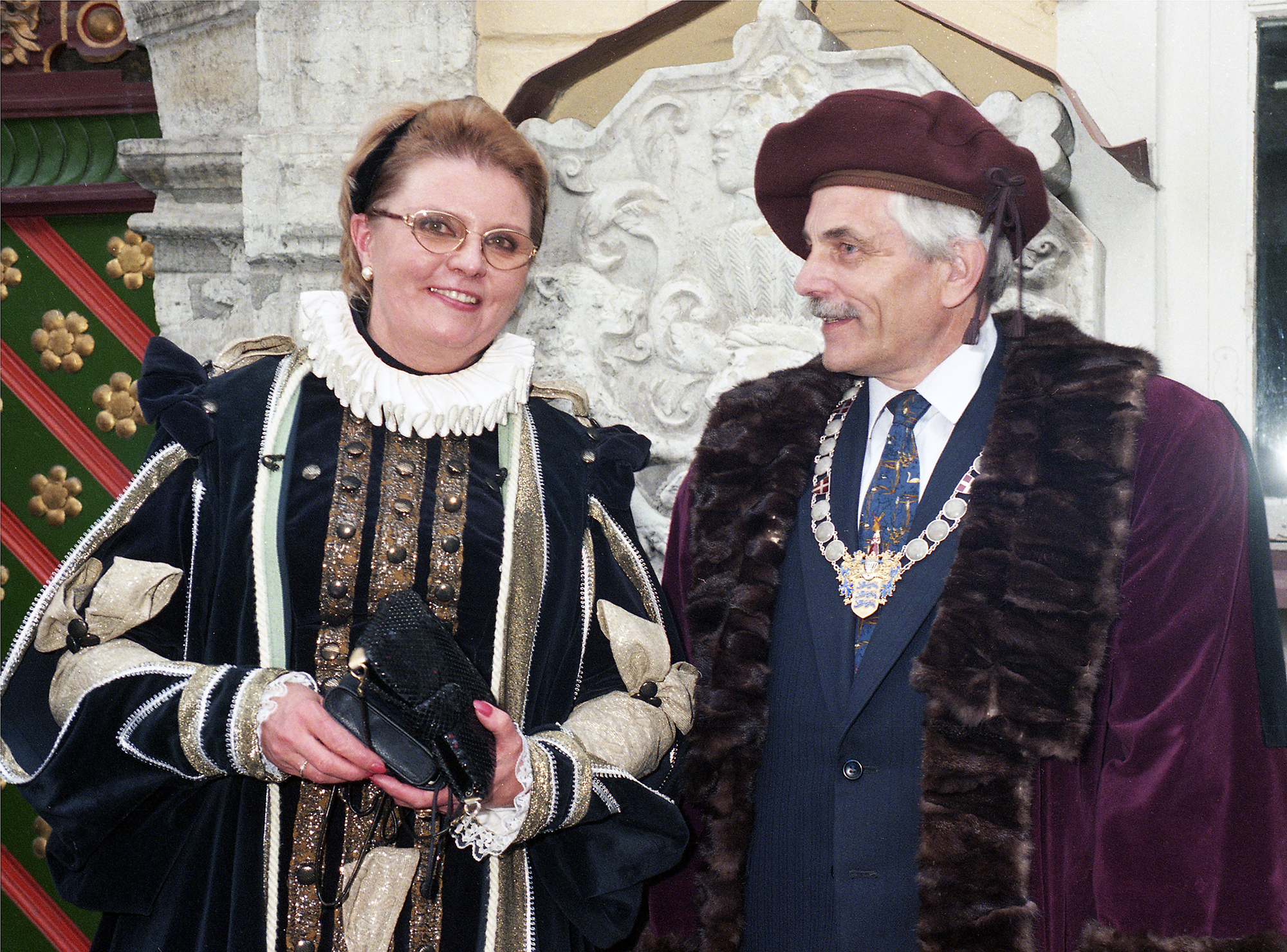 Siiri Oviir ja Peeter Lepp, Tallinna eksmeer Vanalinna päevadel 99